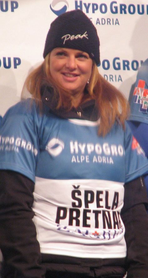 Špela Pretnar